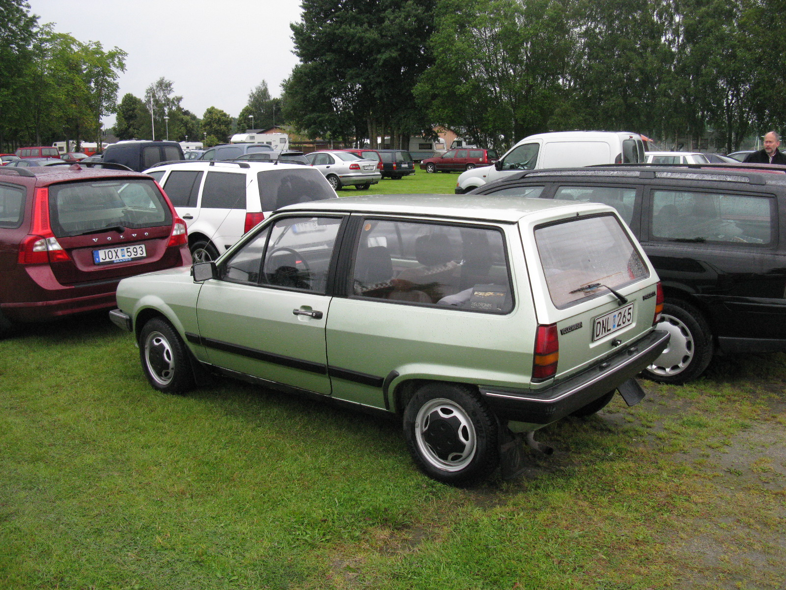 Volkswagen Polo CL